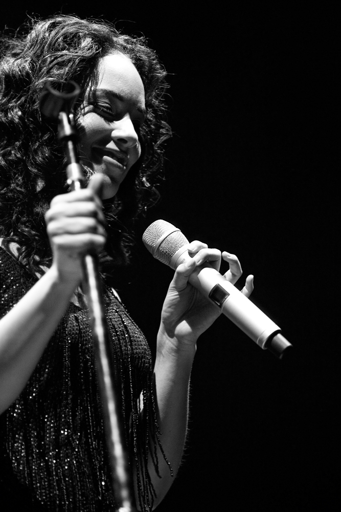 Alicia Keys performing at Pavilhão Atlântico